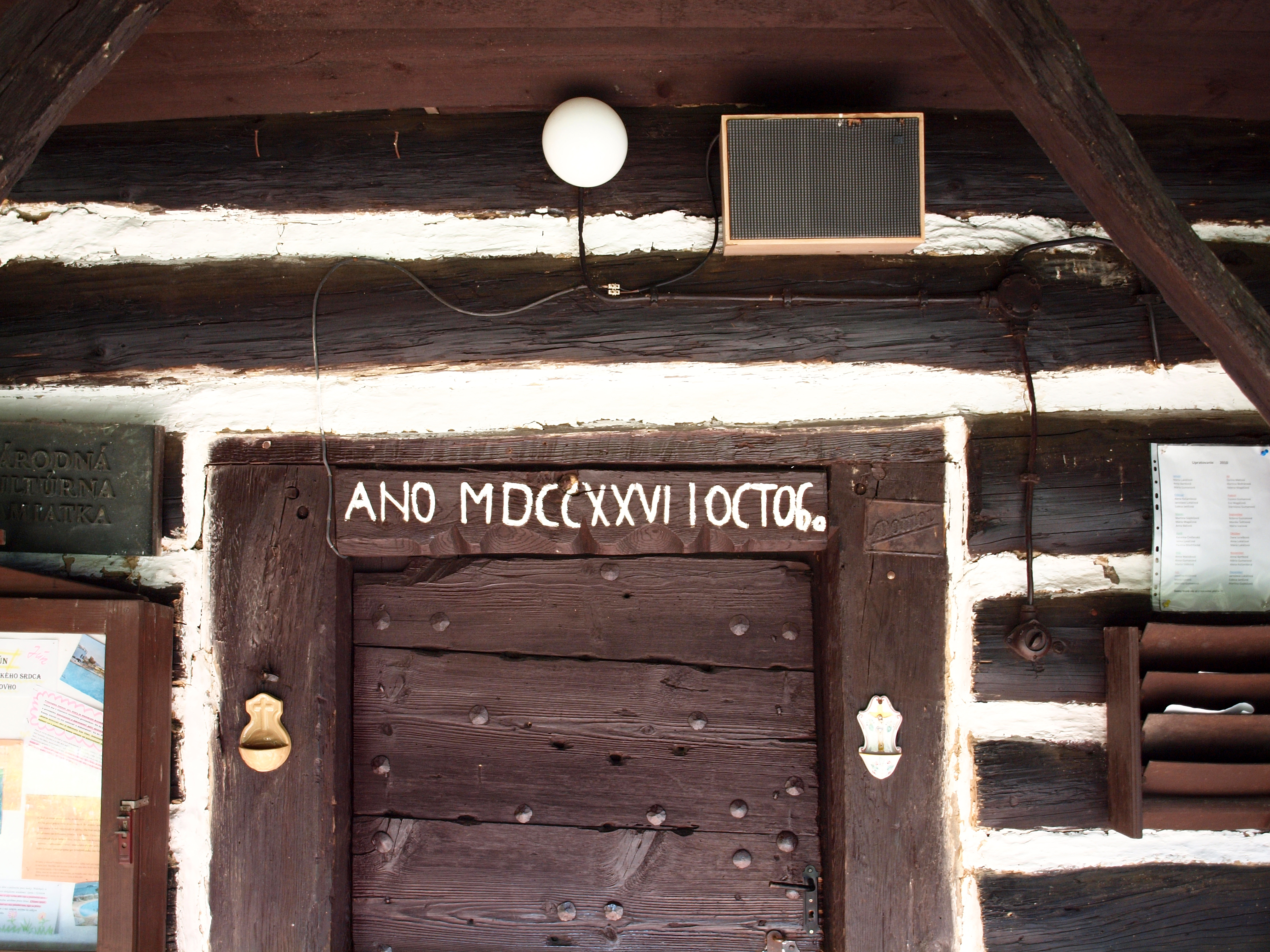 Brežany (Slovakia) - Inscription 1727 sur l'entrée de l'église Saint-Lucas